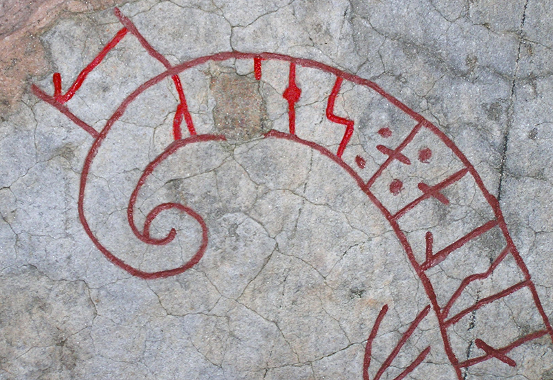 Sö279 strängnäs